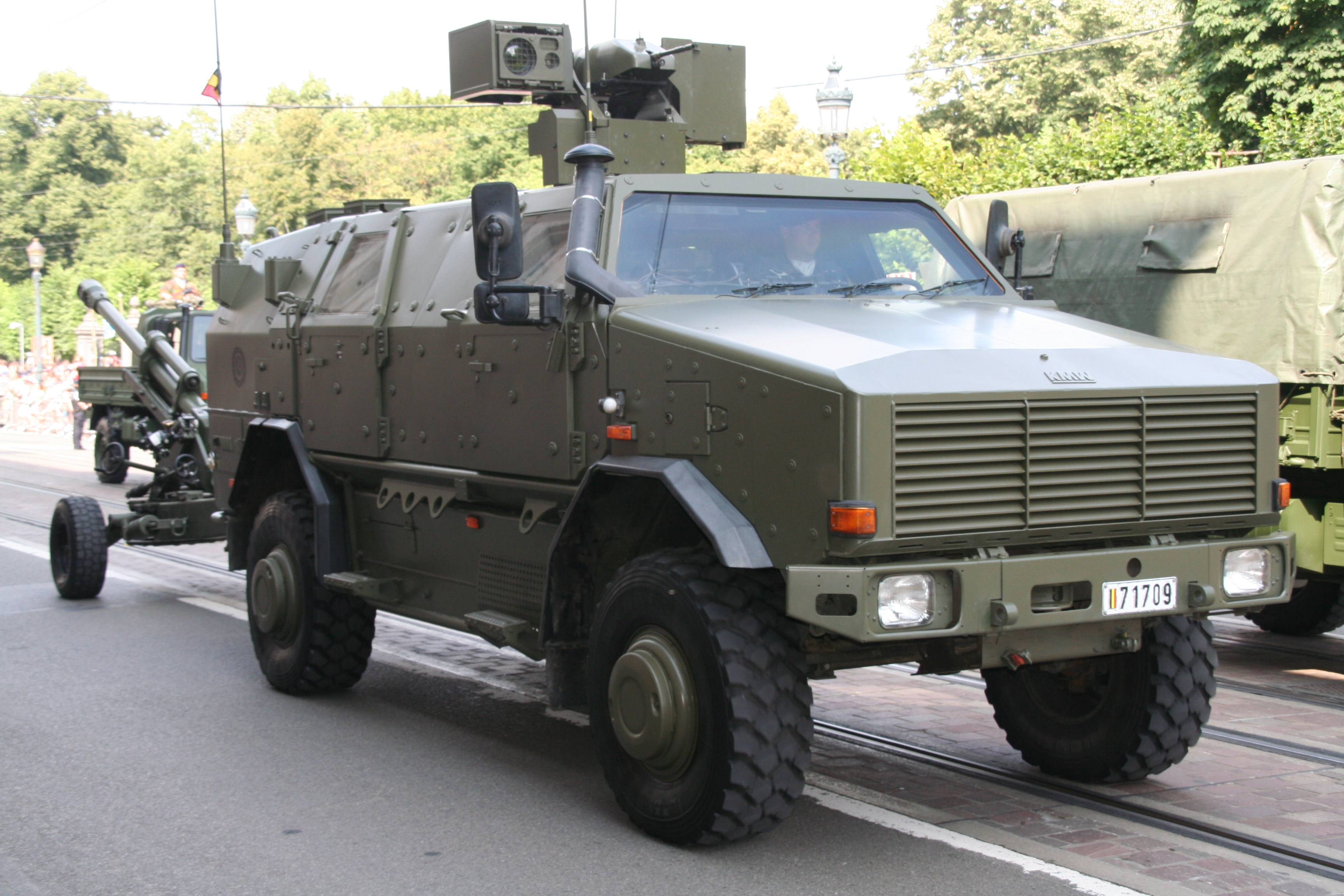 Fête nationale belge à Bruxelles le 21 juillet 2016 - Armée belge (Défense)